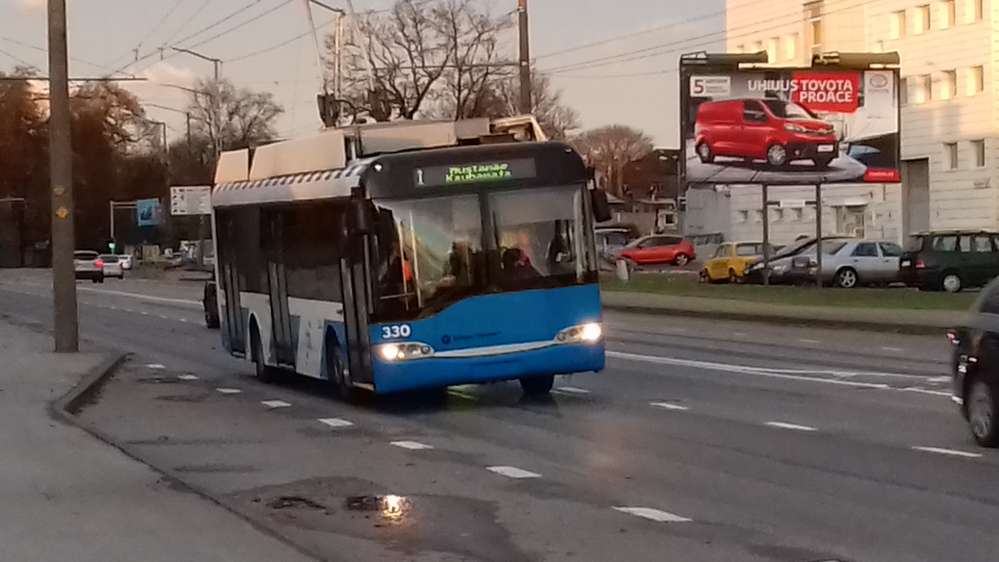 1 Trolliliin Mustamäe teel